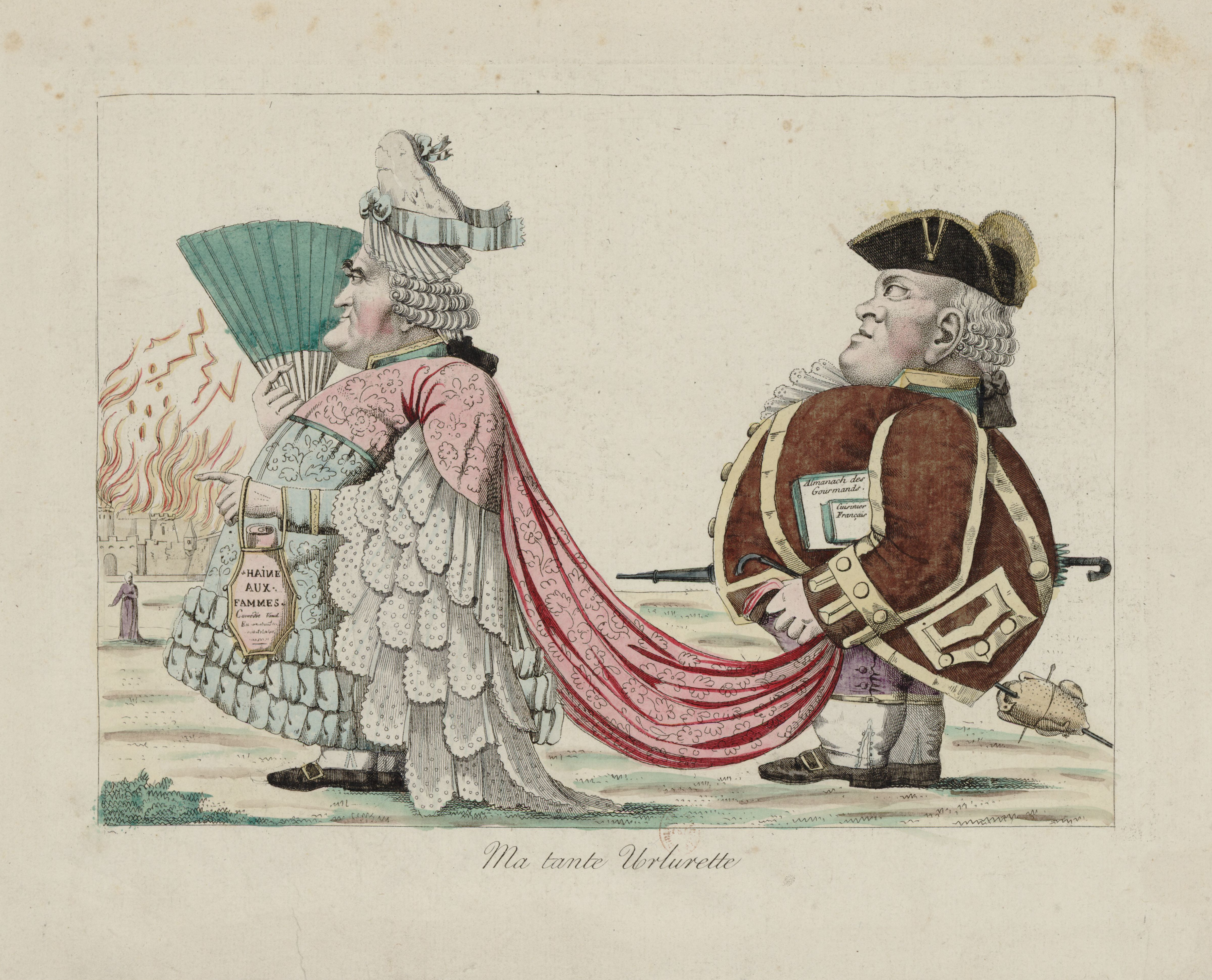 Gravure montrant l'archichancelier Cambacérès en "tante Urlurette".